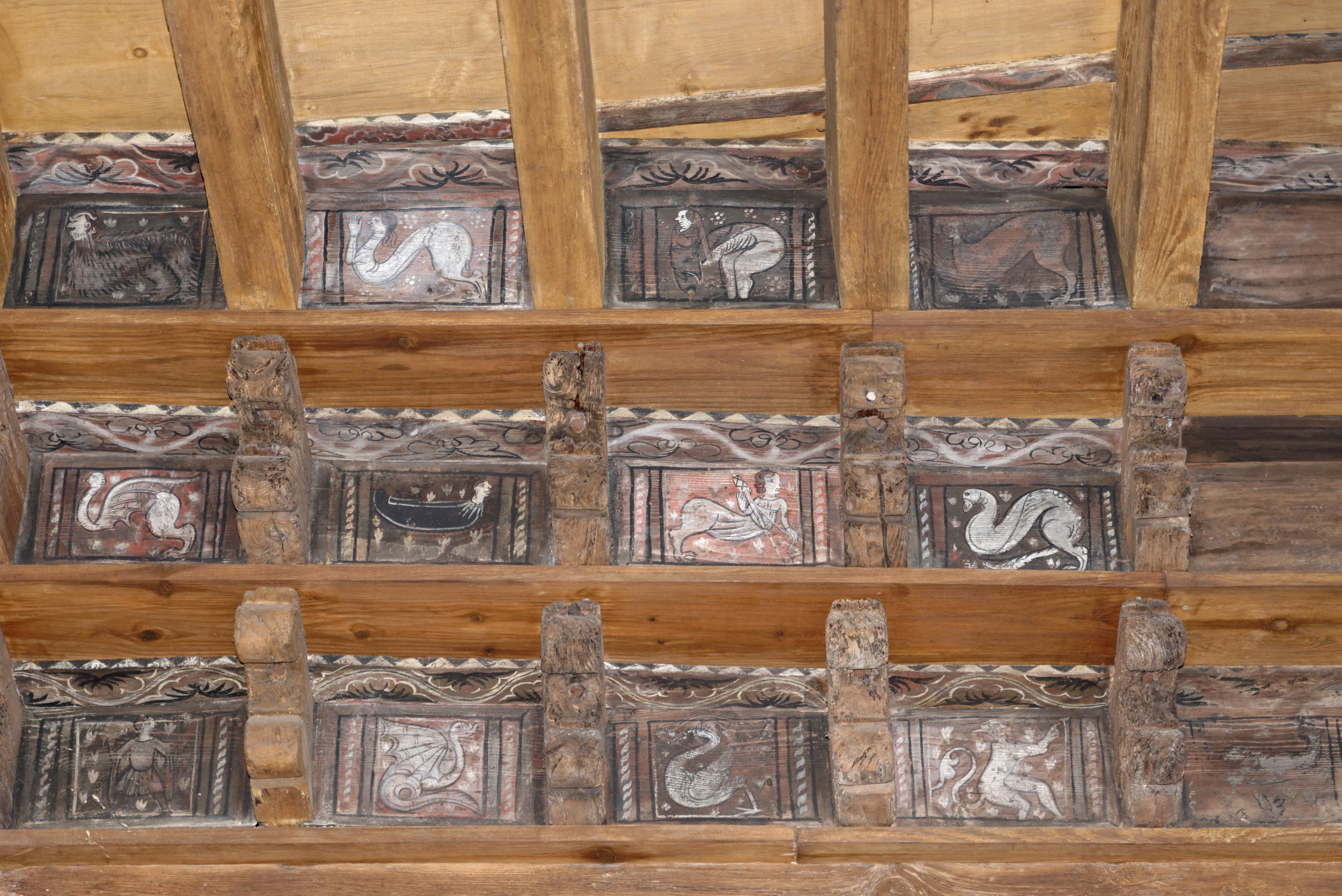 Peintures du plafond du cloître de la cathédrale Saint Léonce (XIV ème siècle). (Fréjus, Var, France) .